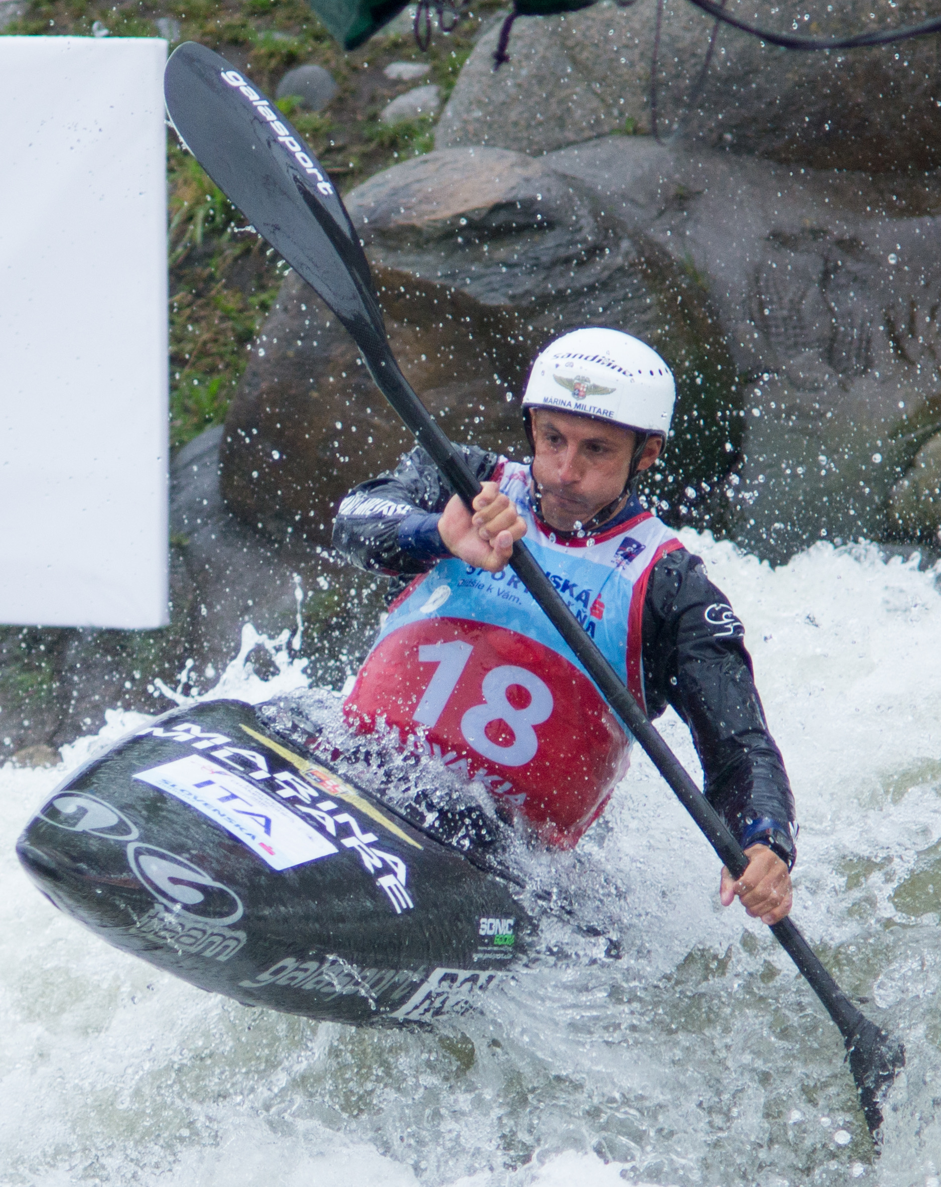 Andrea Romeo